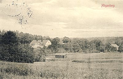 Högantorps gård 1906 på ett vykort